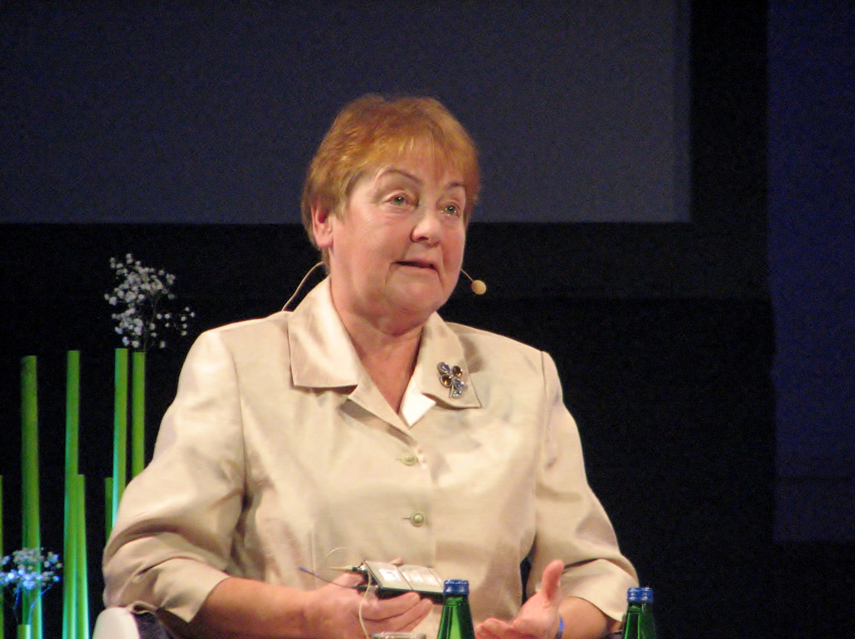 Lagle Parek esinemas Estonia kontserdisaalis konverentsil "ERSP 25 – milleks meile erakonnad?"